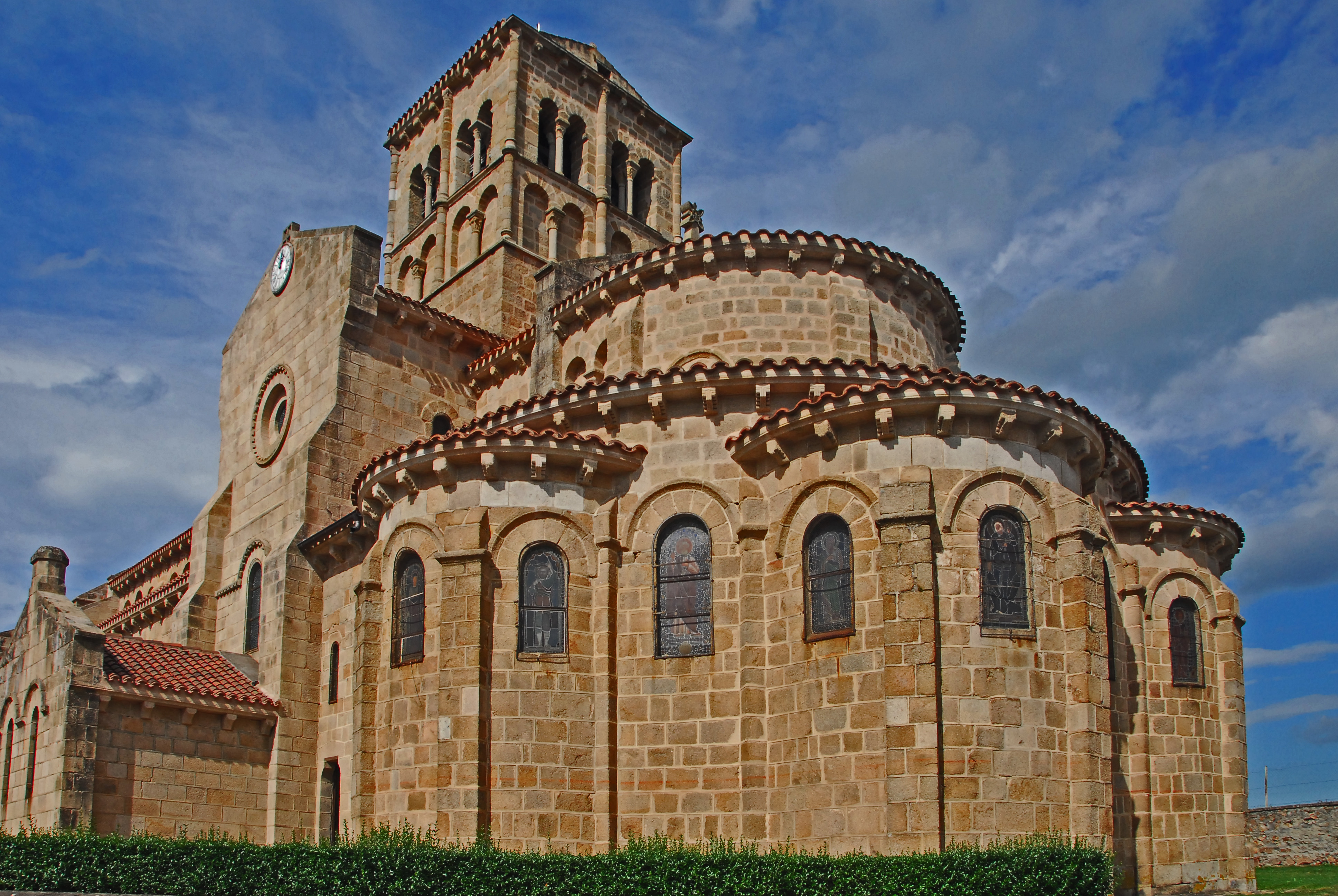 N.-D. de Châtel-Montagne, Chorhaupt von SO